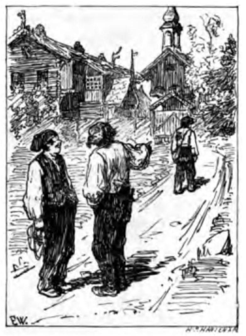 Fra eventyret Askeladden som fikk Prindsessen til at løgste seg